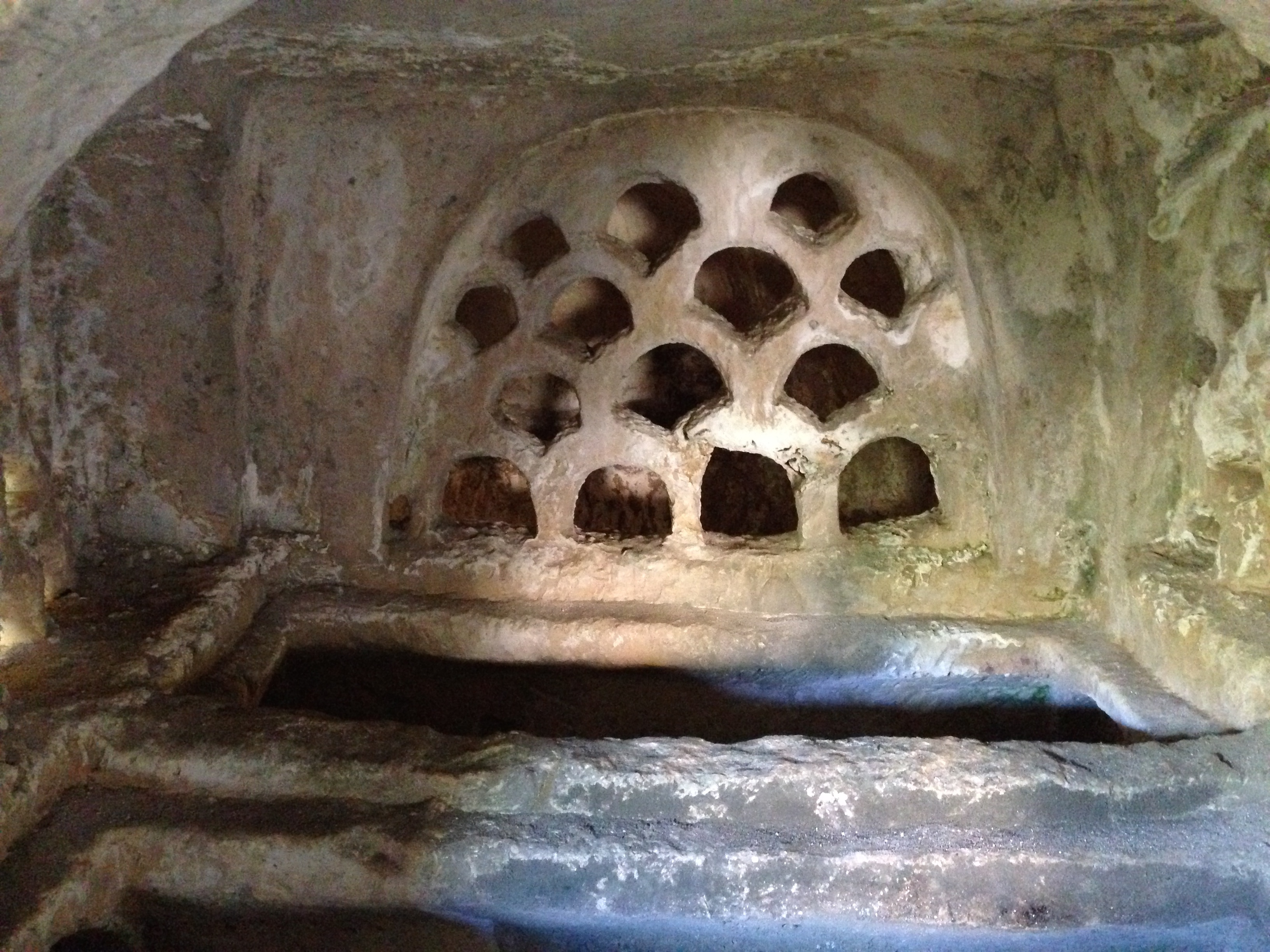 Catacombe di Akrai